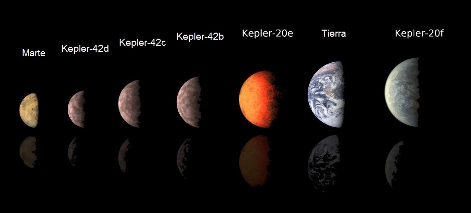 Los planetas extrasolares más pequeños. Versión español de File:Sizing Up Exoplanets.jpg.